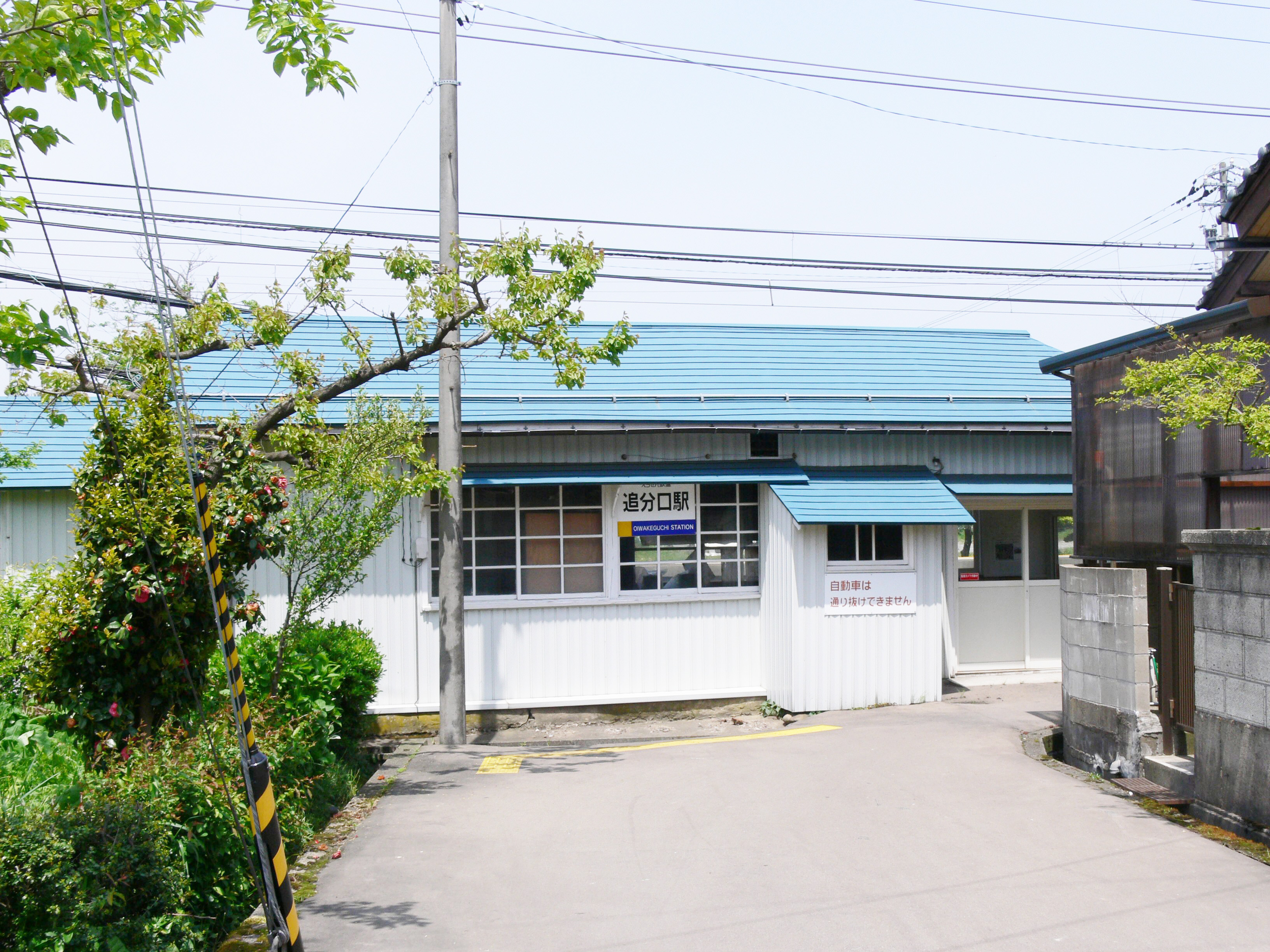 Oiwakeguchi Station 追分口駅 駅舎